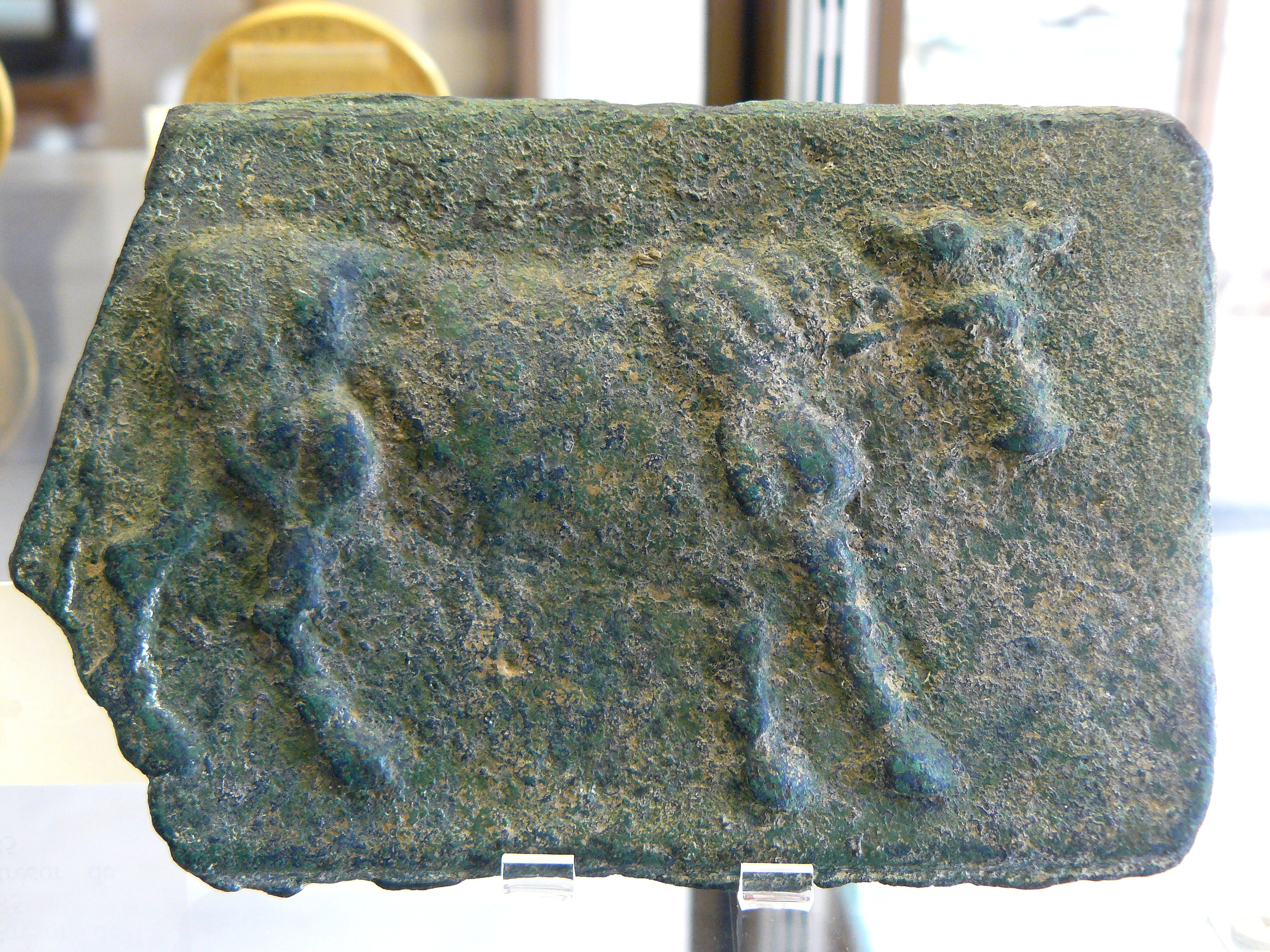 Aes signatum, Proto-monaie, lingot de bronze, Rome, fin du IVe ou début du IIIe siècle avant J-C. - longueur environ 15 cm - environ 1,4 kg - provenance : Cabinet des curiosités de la Bibliothèque sainte Geneviève - Cabinet des médailles, Paris